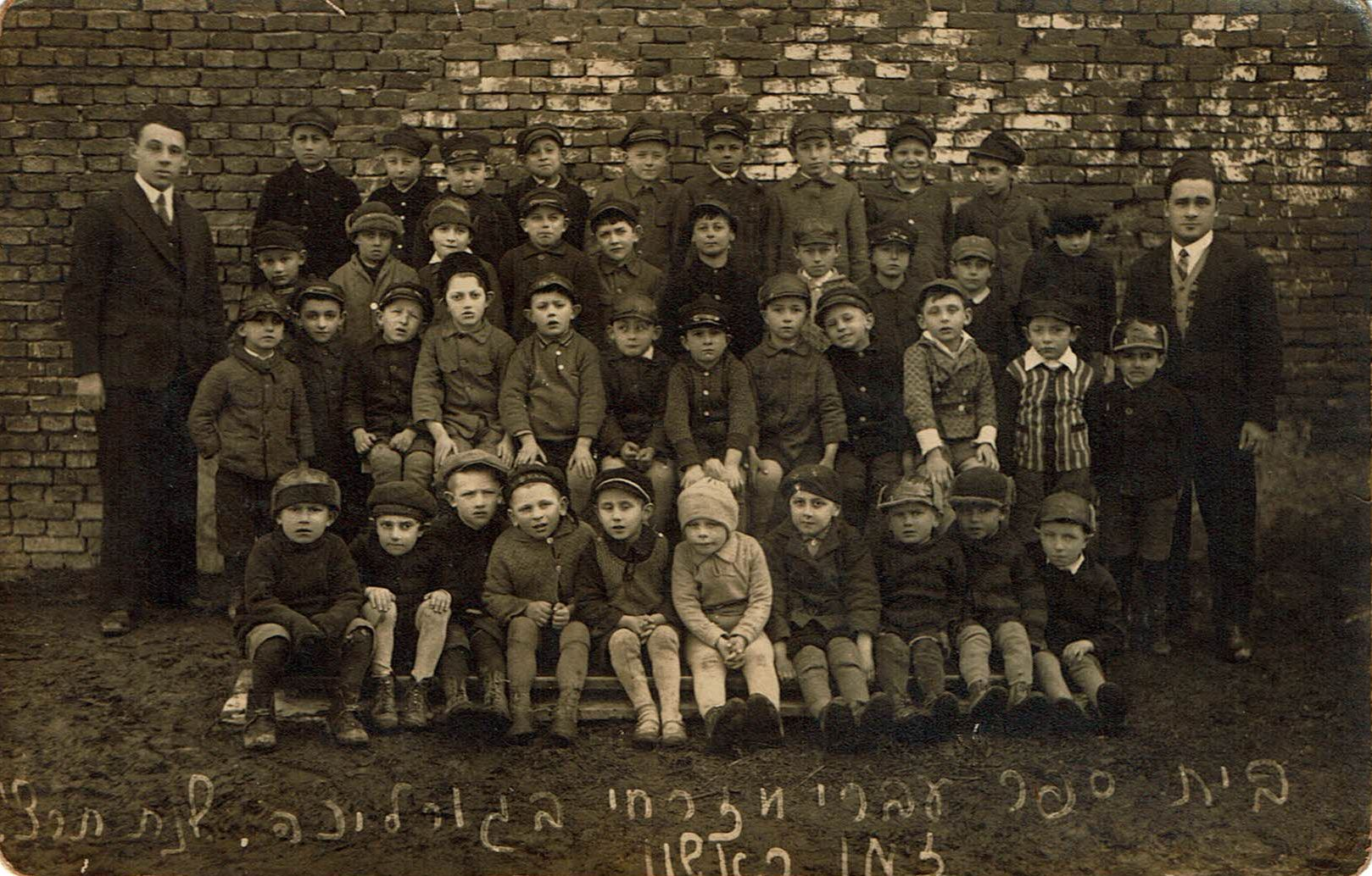 תלמידי בית ספר מזרחי (חדר עברי) כפי שצולמו בשנת תרצ"ג. בתמונה נראים אנשי הצוות: בן-ציון רוב (מנהל) וישראל הרץ (מורה)